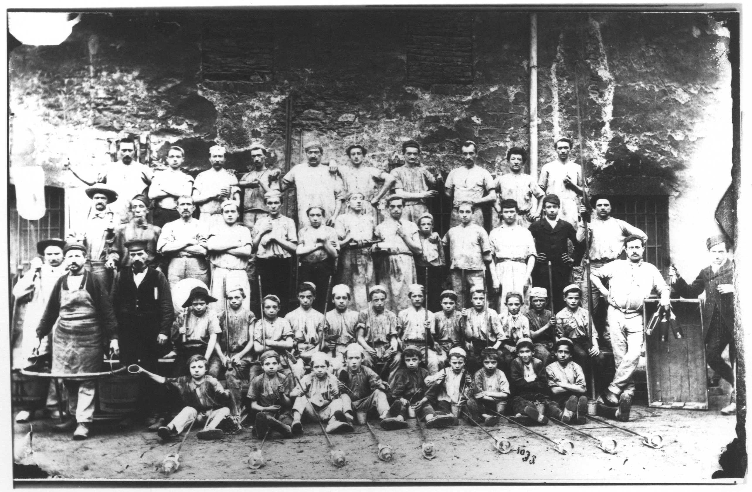 Verriers de Givors, env. 1880. Archives municipales de Givors, cote 5Fi 1796